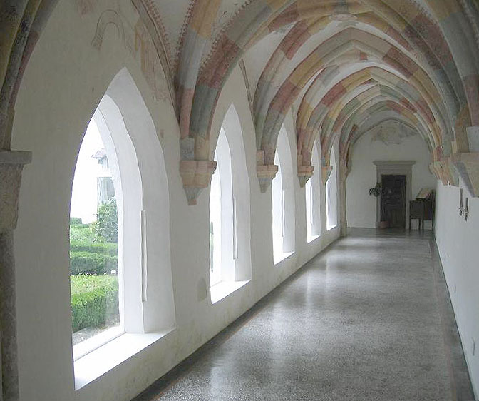 Monastery Sittich, Slovenia / samostan Stična, Slovenija / Kloster Sittich, Slowenien